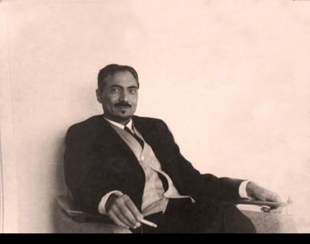 منيس السعدي